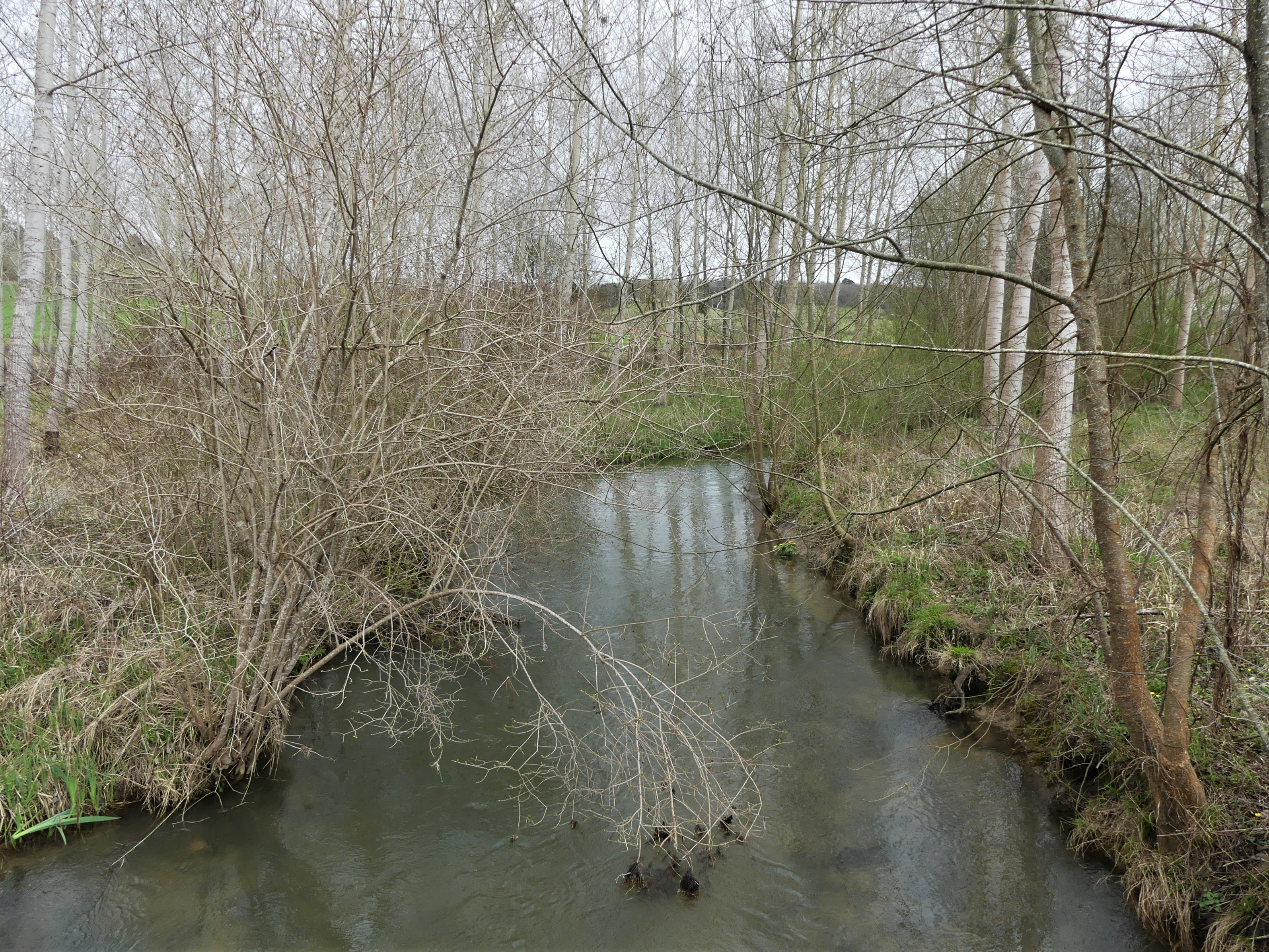 La Crempse au sud du lieu-dit Goiran, en limites de Saint-Hilaire-d'Estissac (à gauche) et Beleymas (en rive opposée), Dordogne, France. Vue prise en direction de l'amont.